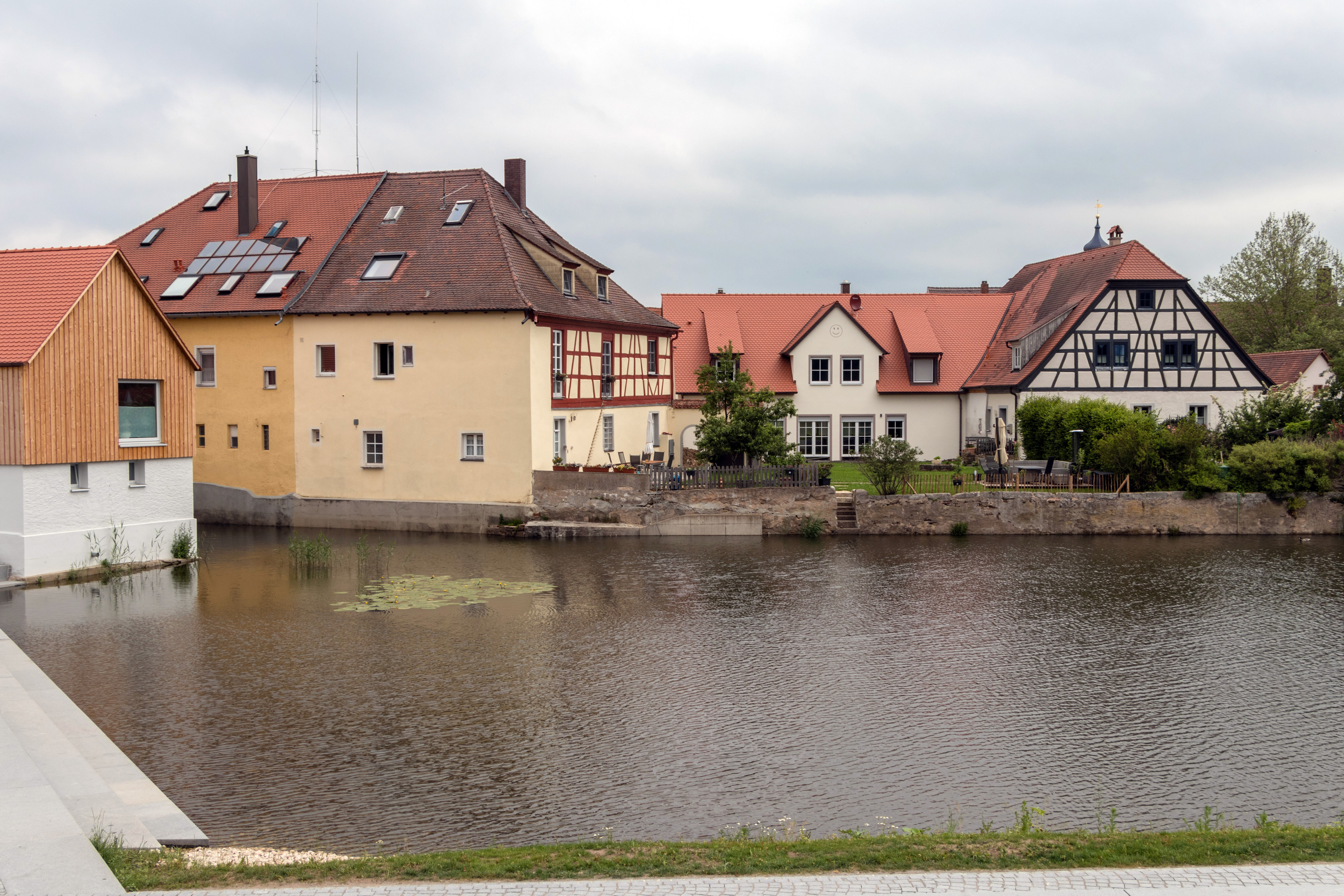 Kleine Landesgartenschau, 2019, Wassertrüdingen, Stadtmühle